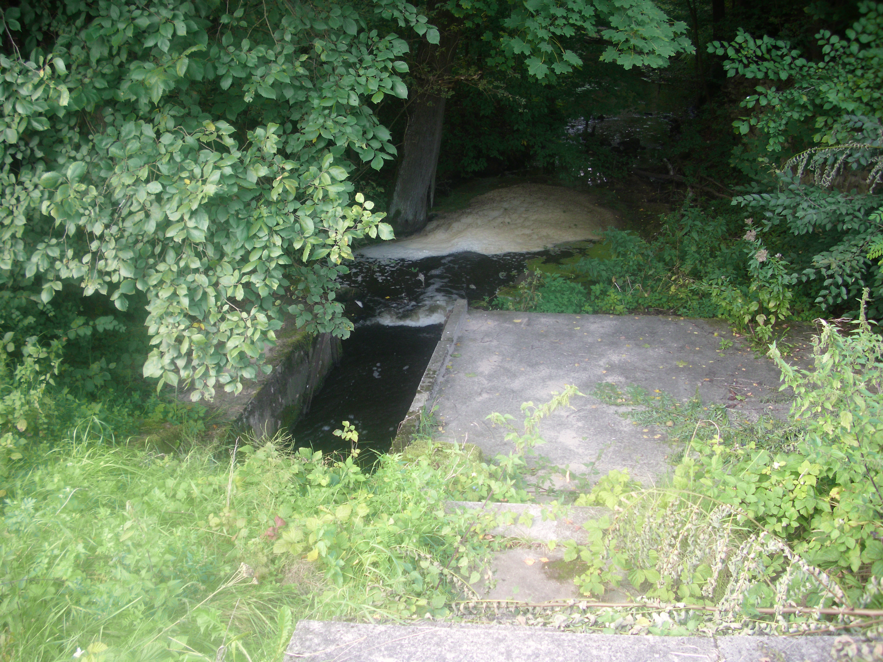 Anlagenreste der Jankemühle, Friedland im Naturpark Schlaubetal, Brandenburg